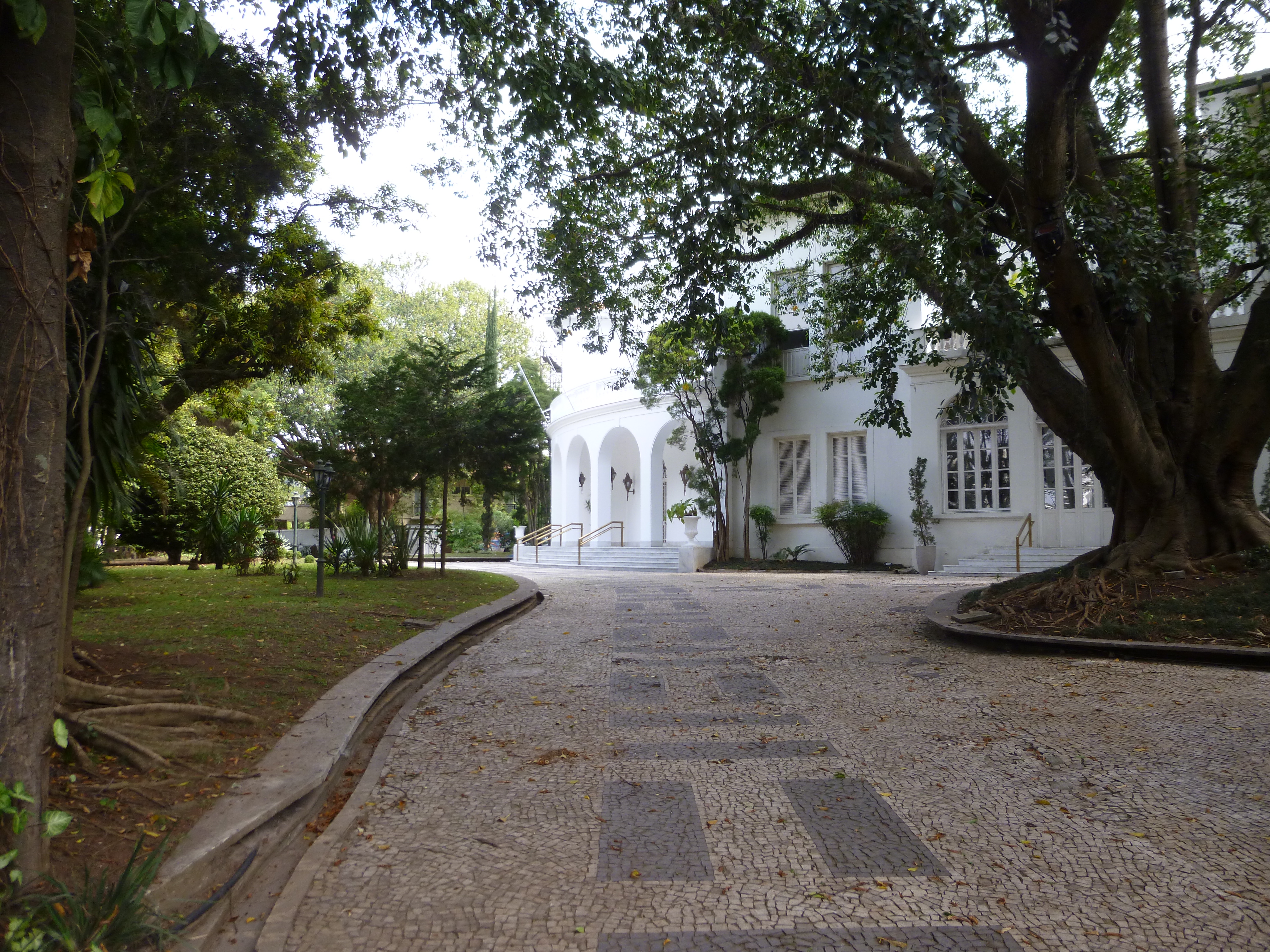 Entrada do edifício da Faculdade de Medicina da Universidade de São Paulo complementar ao complexo.